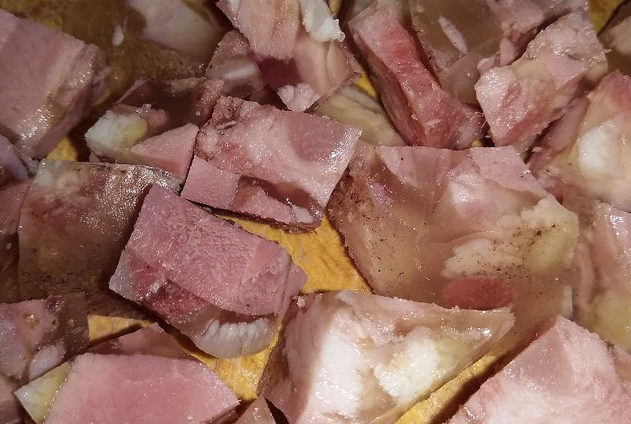 Tobă tagliata a dadini